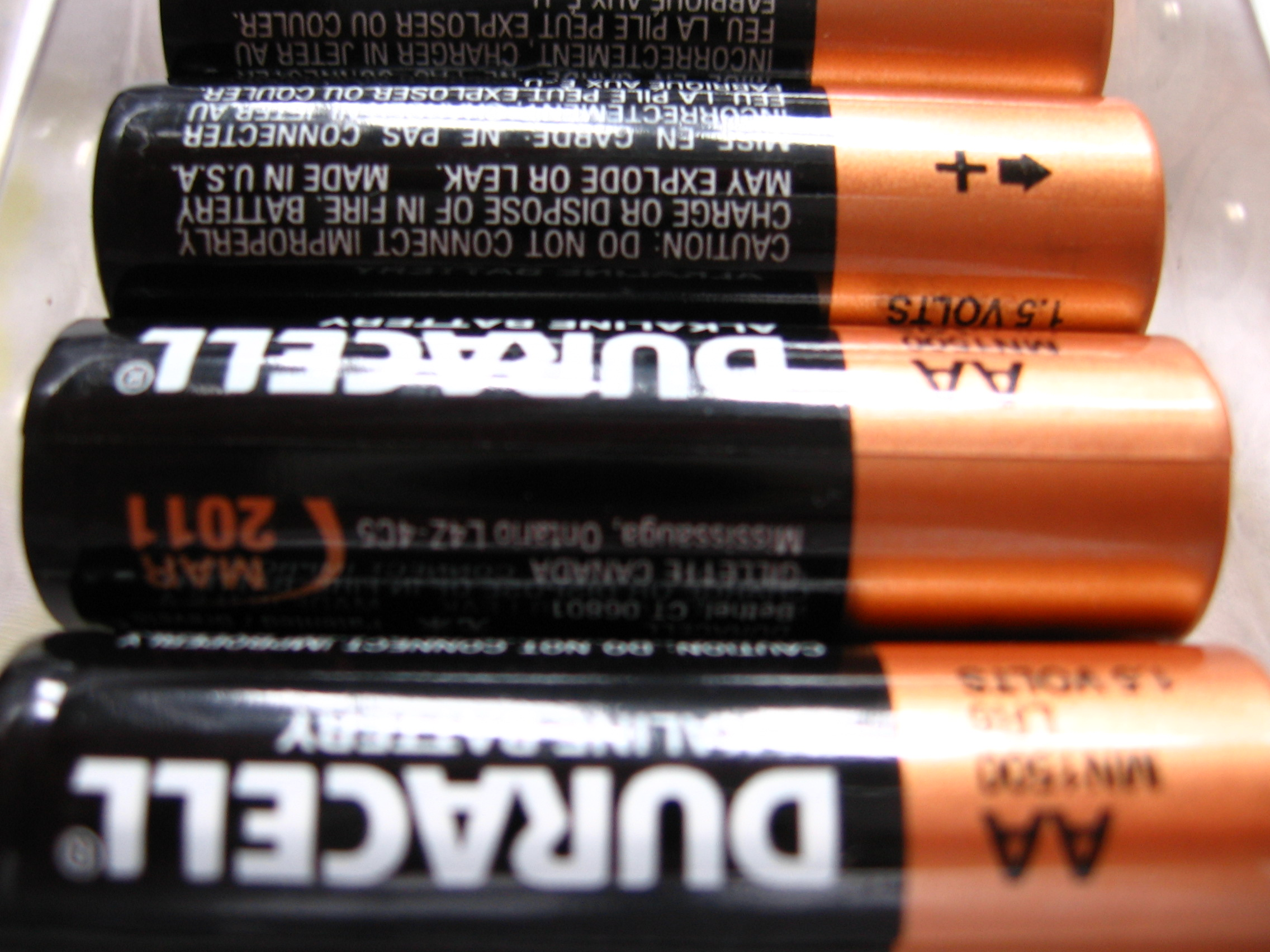 Duracell AA alkaline batteries